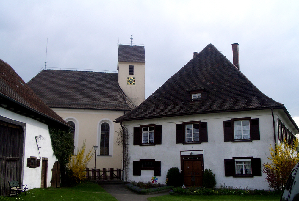 Kirche St. Isidor und ehemaliges Pfarrhaus Eggartskirch, Ortsteil Eggartskirch der Ortschaft Taldorf, Stadt Ravensburg.